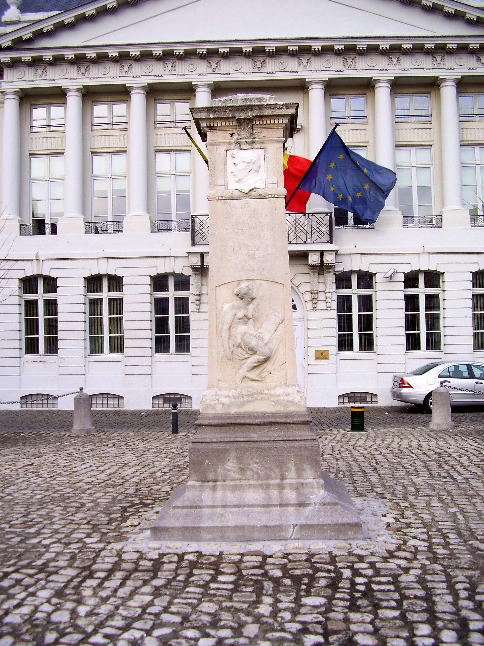 Monument à Jenneval, auteur de la Brabançonne, 1897 - Place des martyrs,Bruxelles